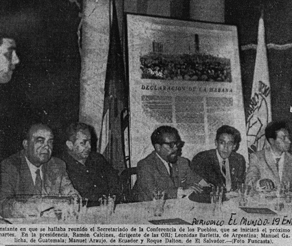 Fotografía del secretariado de la Conferencia de los Pueblos, reunida en la ciudad de La Habana (Cuba). Asistentes: Ramón Calcines (secretario de las Organizaciones Revolucionarias Integradas), Leonidas Barletta (representante de la Argentina), Manuel Galicha (rep. de Guatemala), Manuel Araujo (rep. del Ecuador) y Roque Dalton (rep. de El Salvador). (Diario El Mundo, 19 de enero de 1969; archivo del Museo de la Palabra y la Imagen, El Salvador).